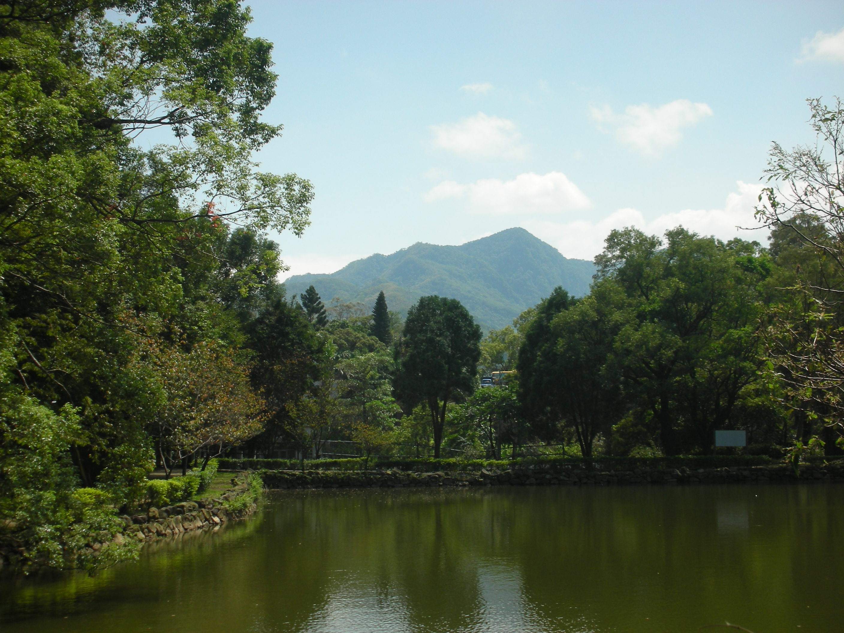 角板山公園 Jiaobanshan Park